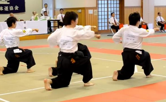 躰道の競技写真(団体法形競技)